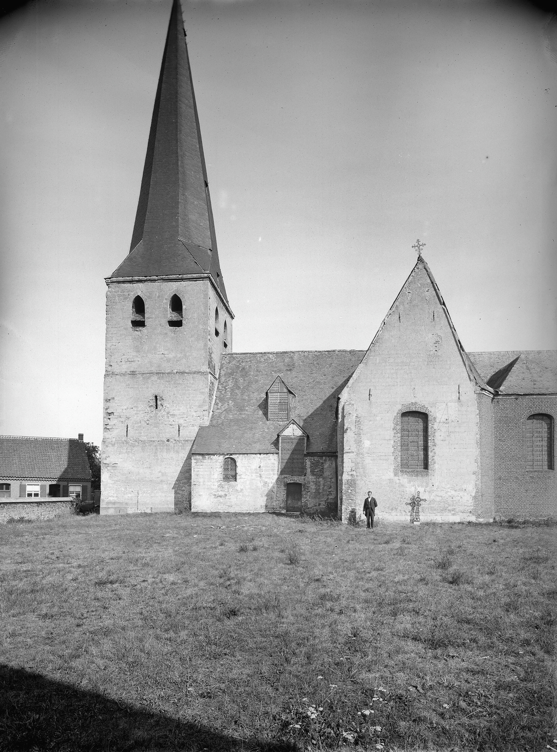 Rooms-Katholieke Kerk: Kerk vanuit het zuid-oosten (opmerking: Fotonummer 9410)